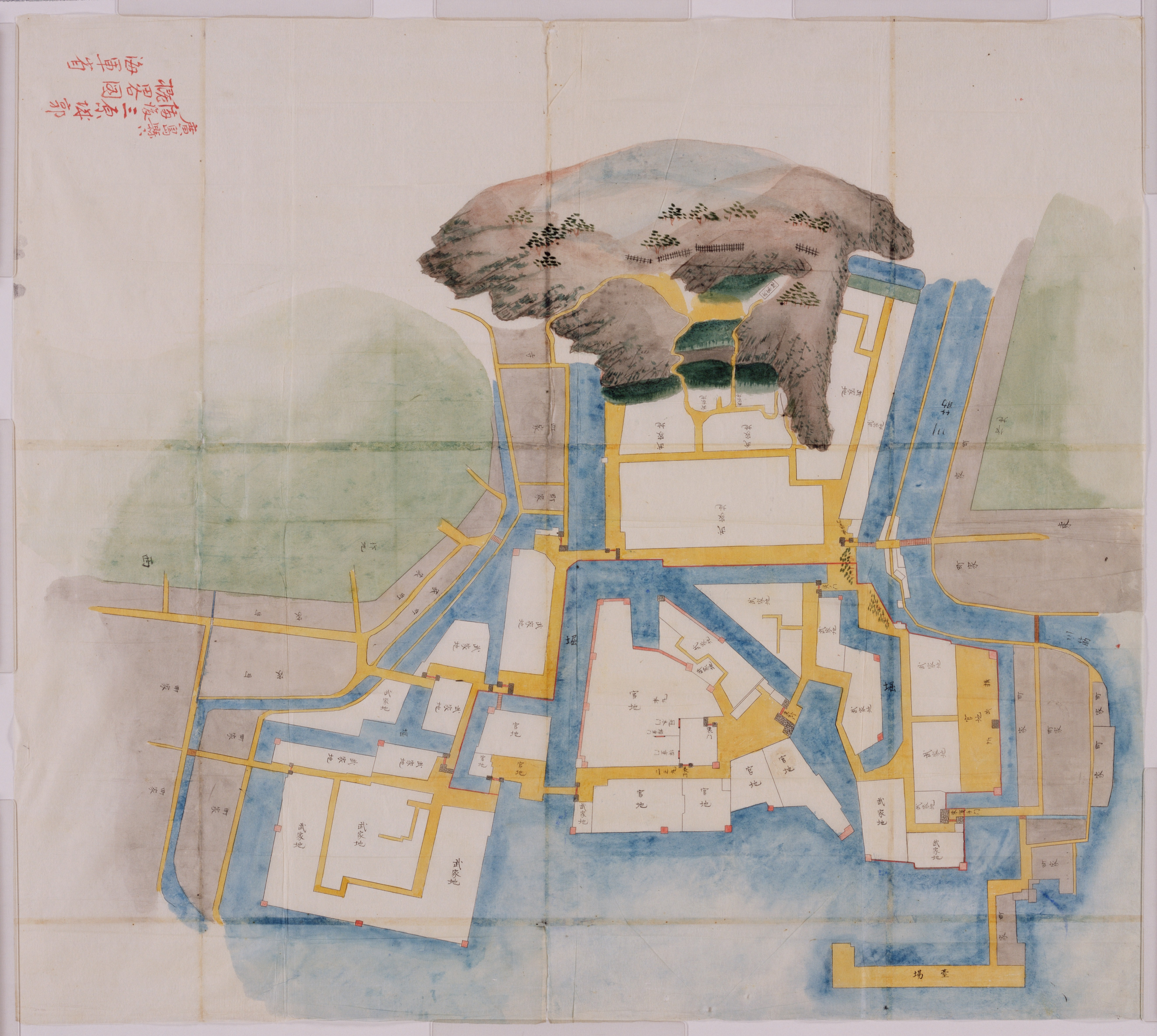 備後国三原城図